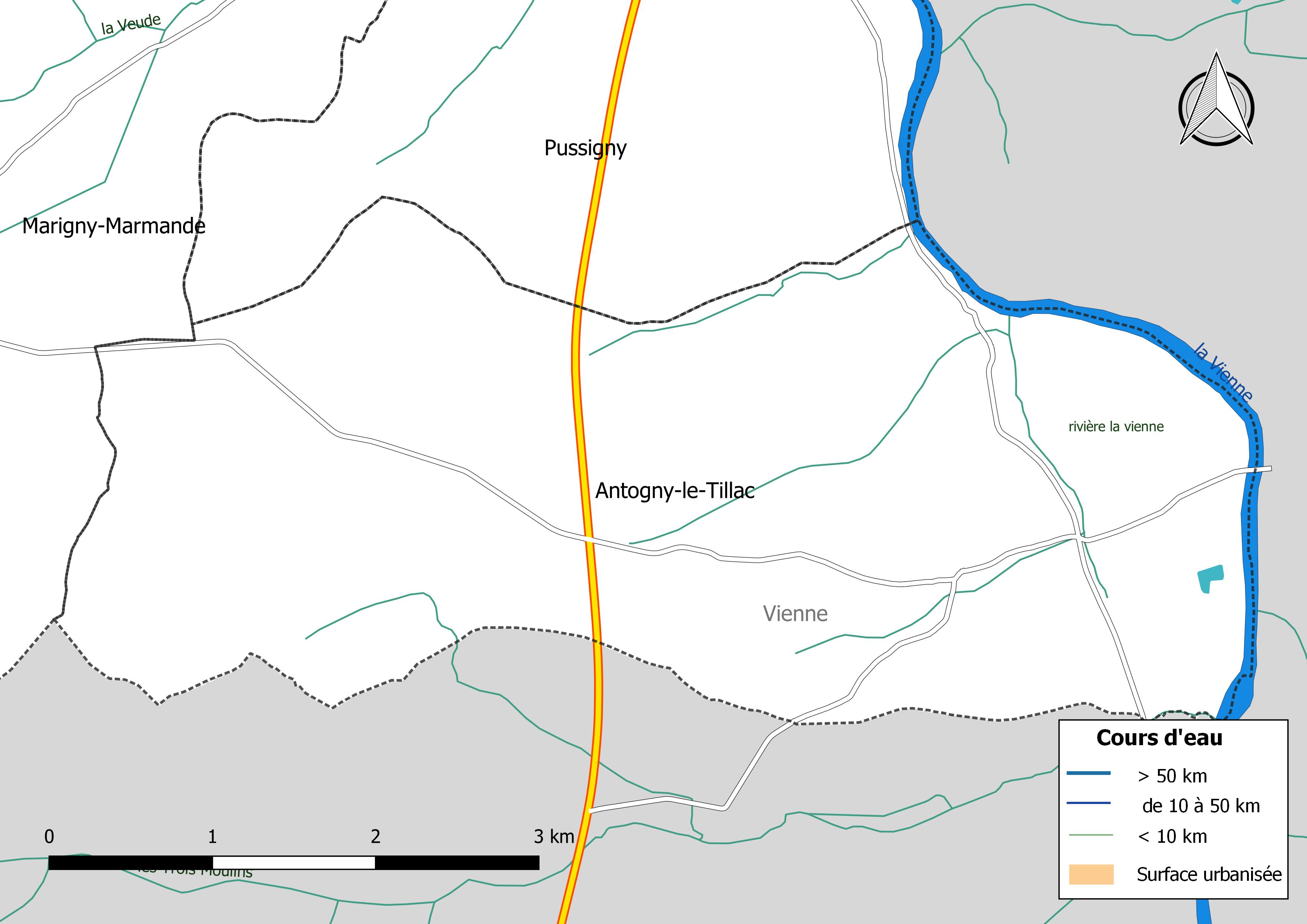 Carte du réseau hydrographique de la commune de Antogny-le-Tillac (France).